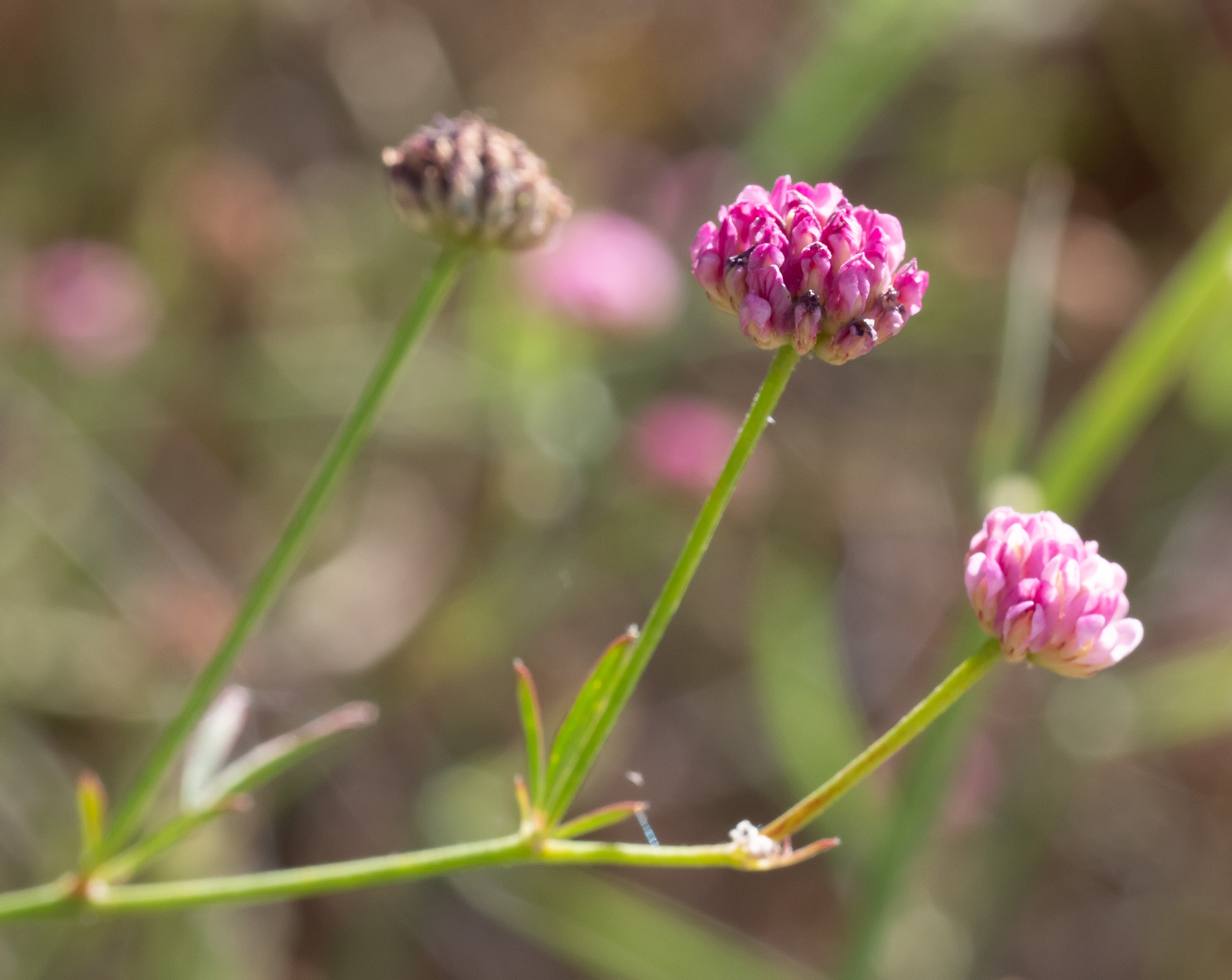 Dorycnopsis gerardii. Losar de la Vera (Cáceres, España).